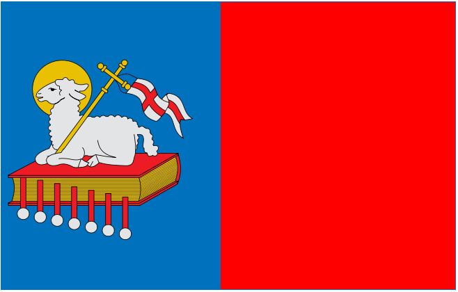 Bandera de Cerdedo.